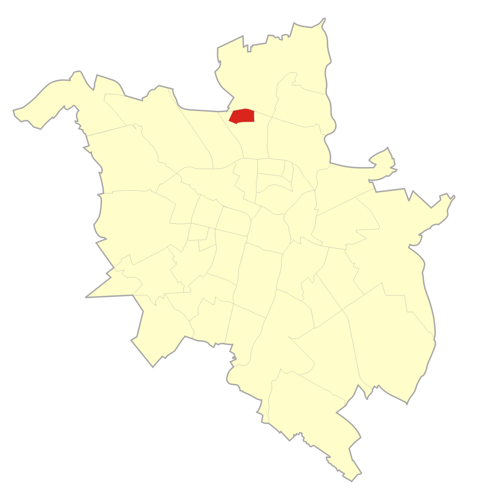 Osiedle Jana III Sobieskiego i Marysieński - jednostka pomocnicza Poznania od 2011 r.